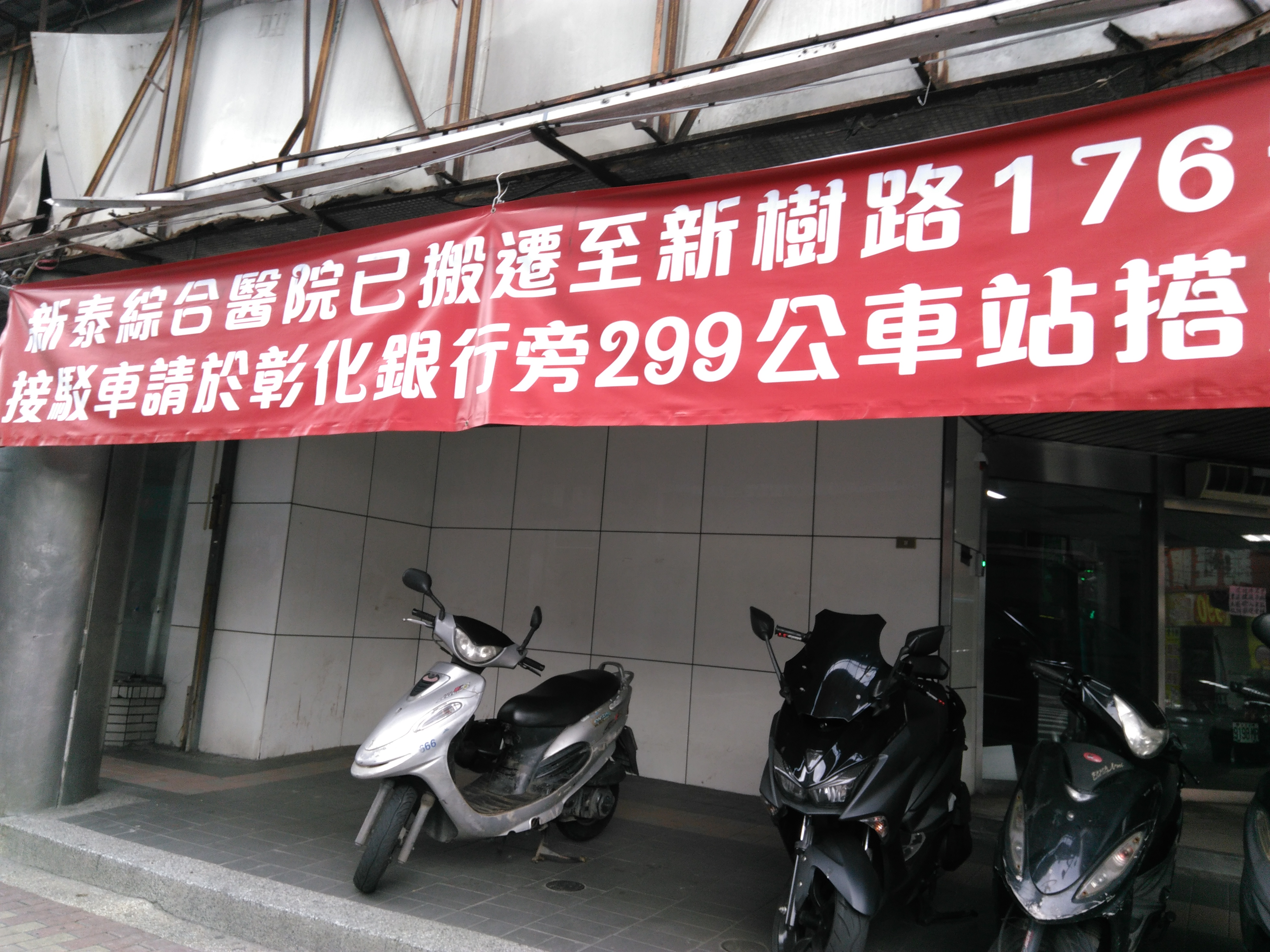 中文（台灣）: 新莊新泰醫院舊址